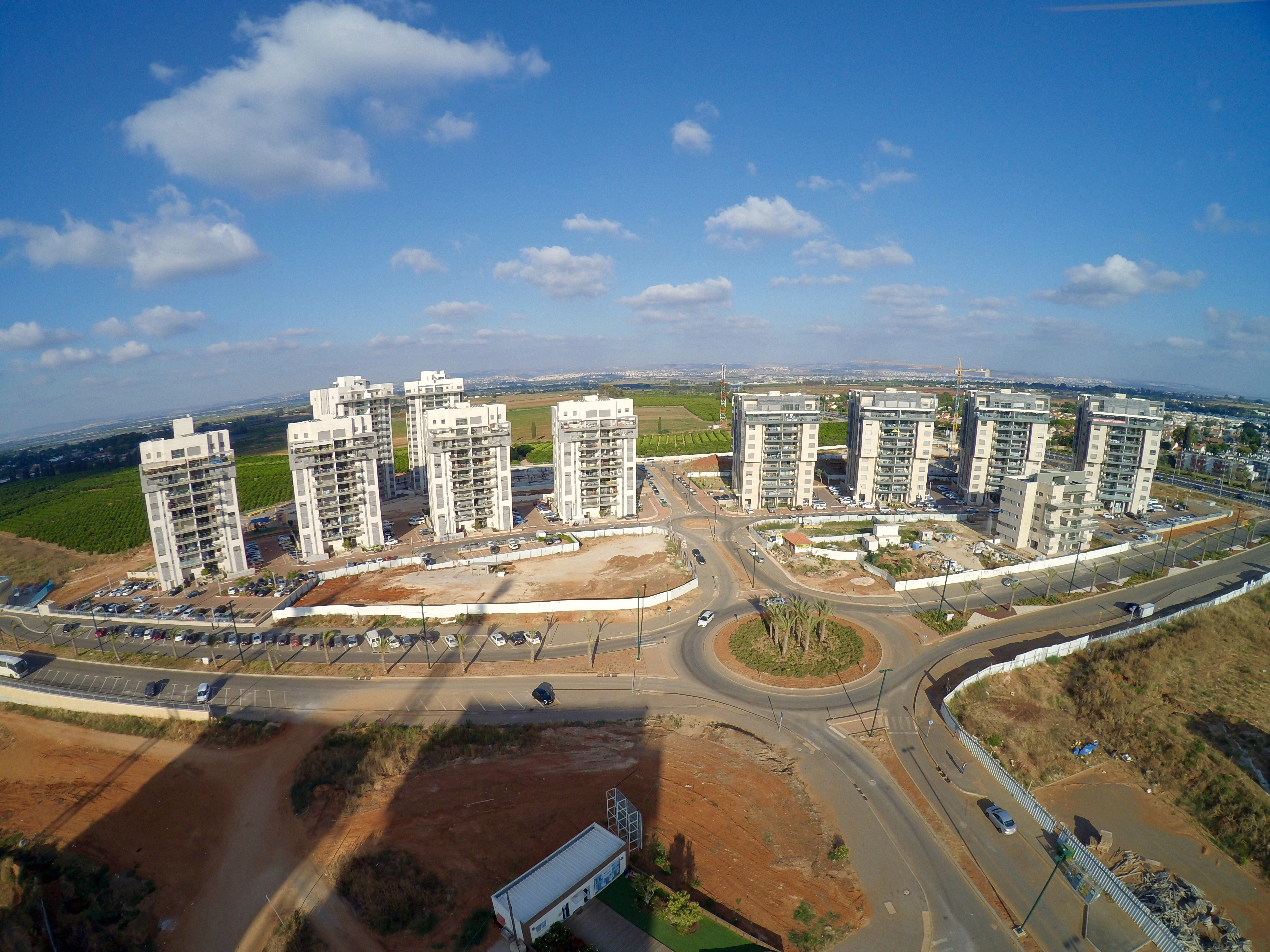 שכונת יפה נוף